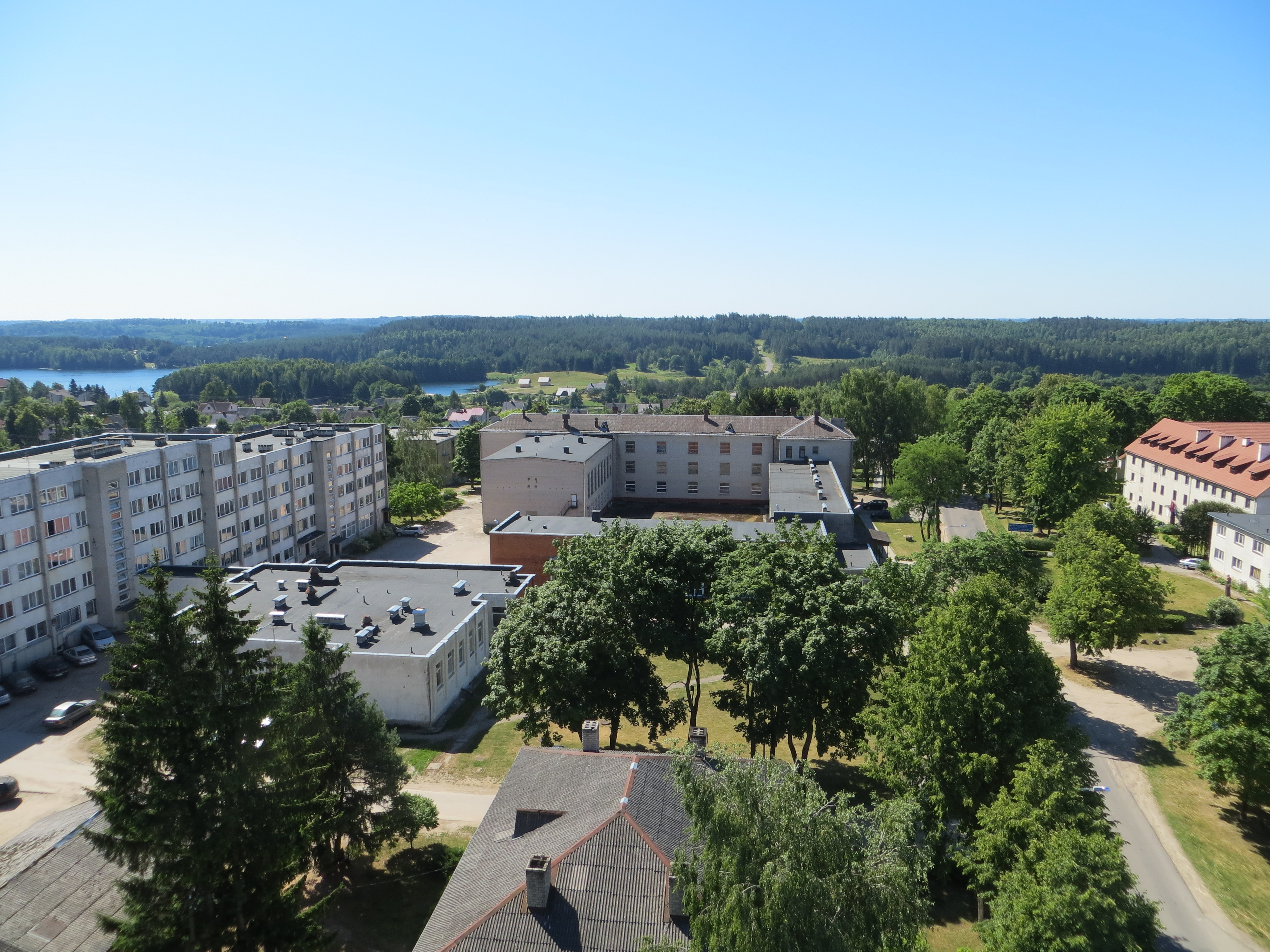 Aukštadvaris, Lithuania